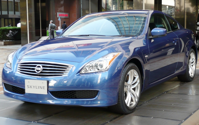 Nissan Skyline Coupe.